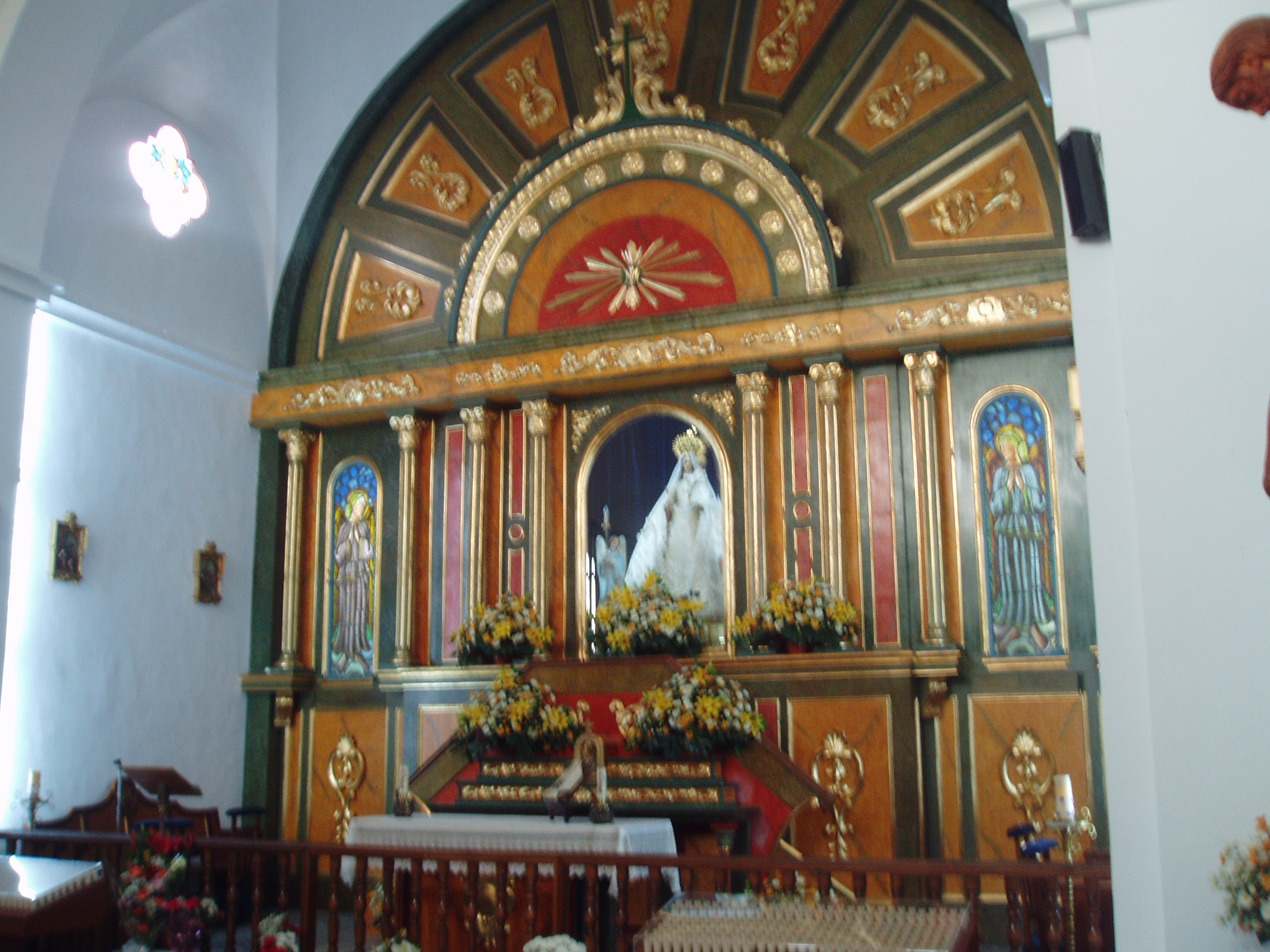 Actual retablo de la ermita desde 1998.